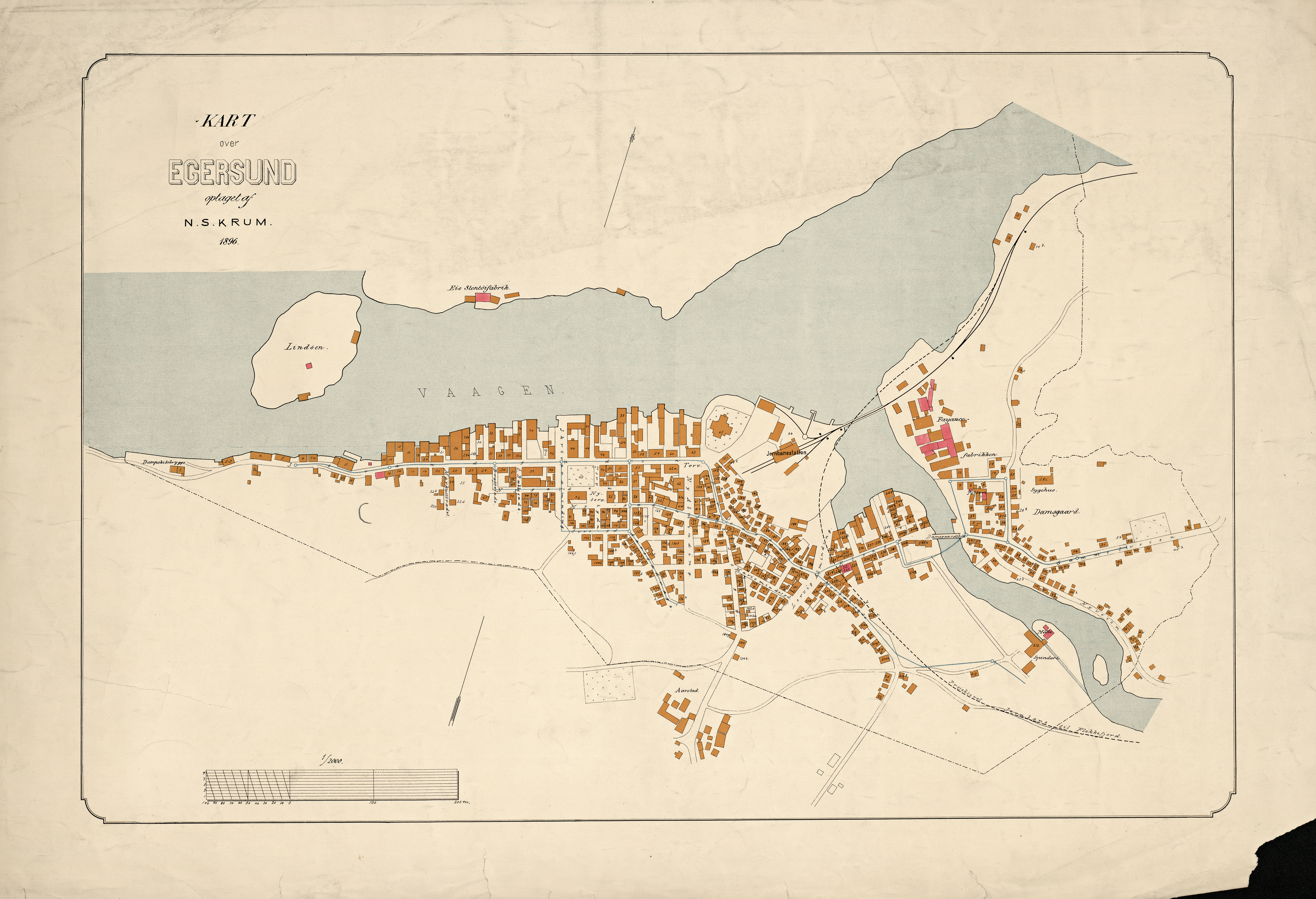 NS Krums kart over Egersund fra 1896.